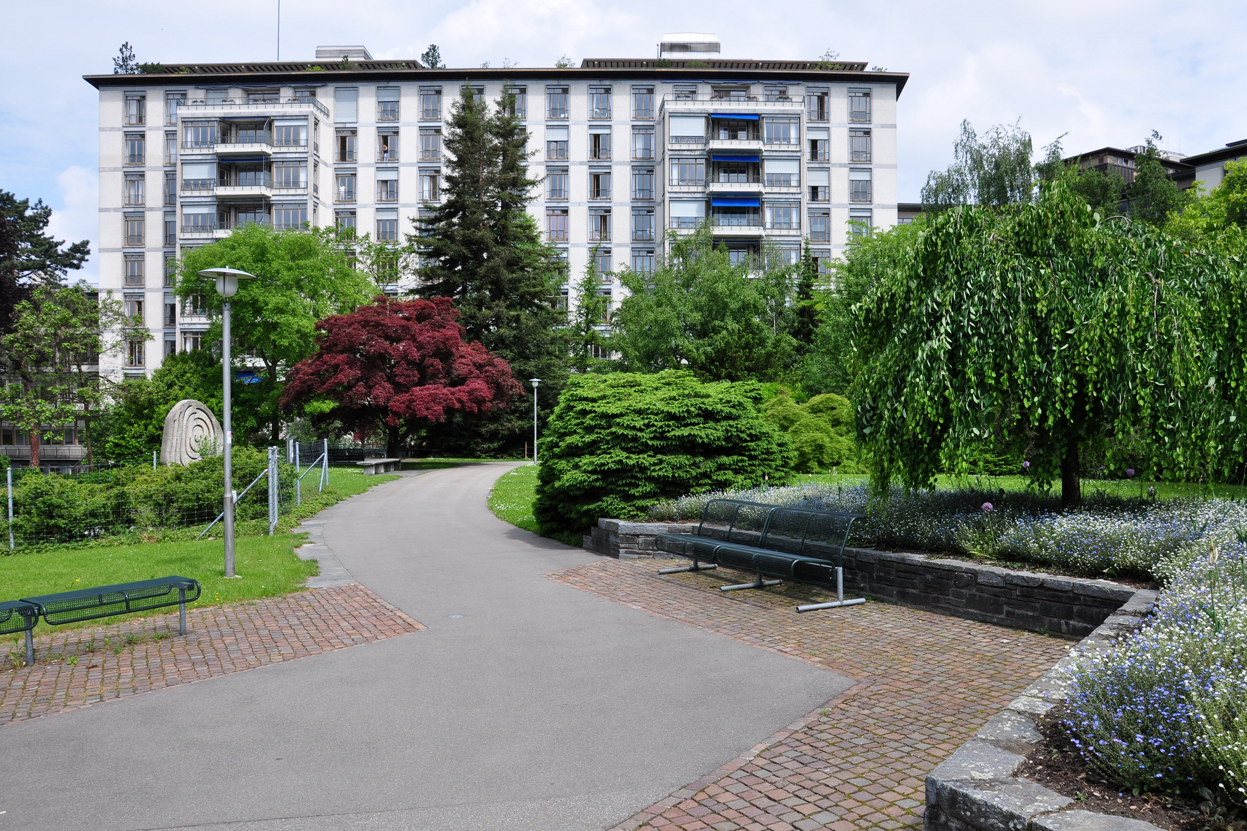 Universitätsspital in Zürich (Switzerland)